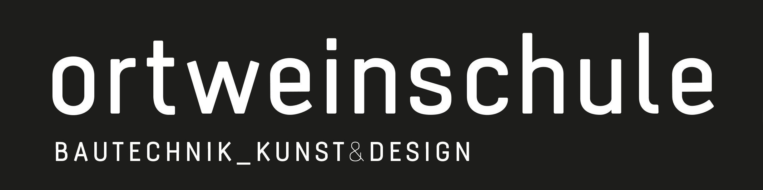 Logo der HTLVA Graz-Ortweinschule